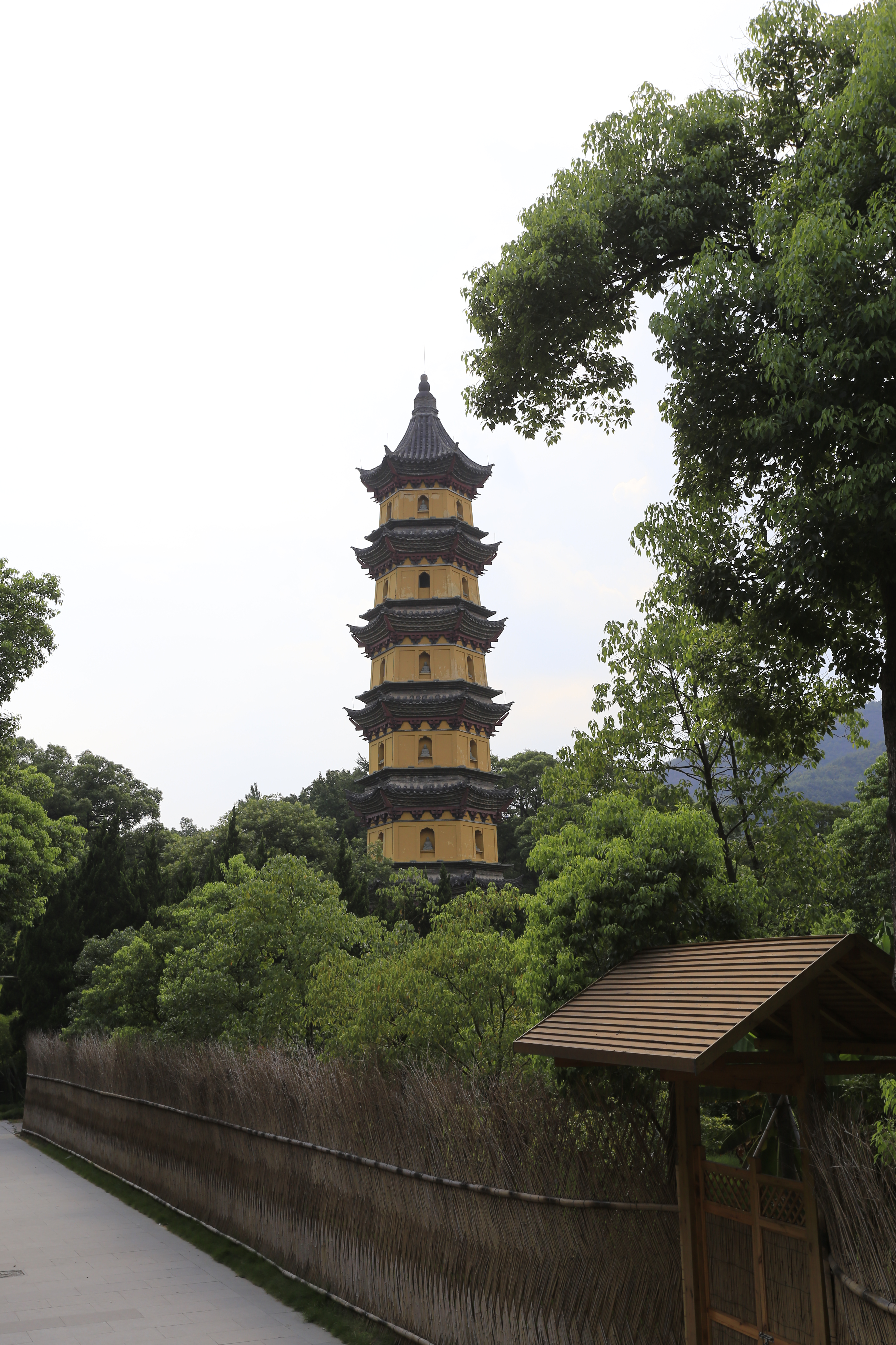 宁波阿育王寺 —— 西塔